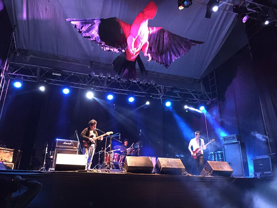 Juan Gris en Festival Selvamonos 2016